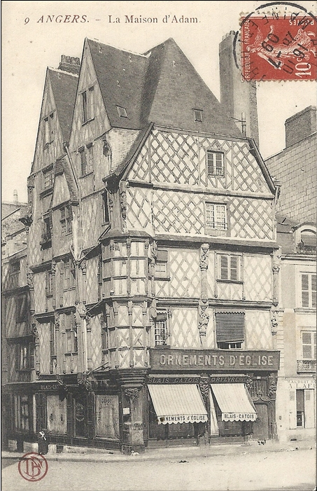 Photo de la Maison d'Adam, prise au début du XXe siècle, avant les restaurations.